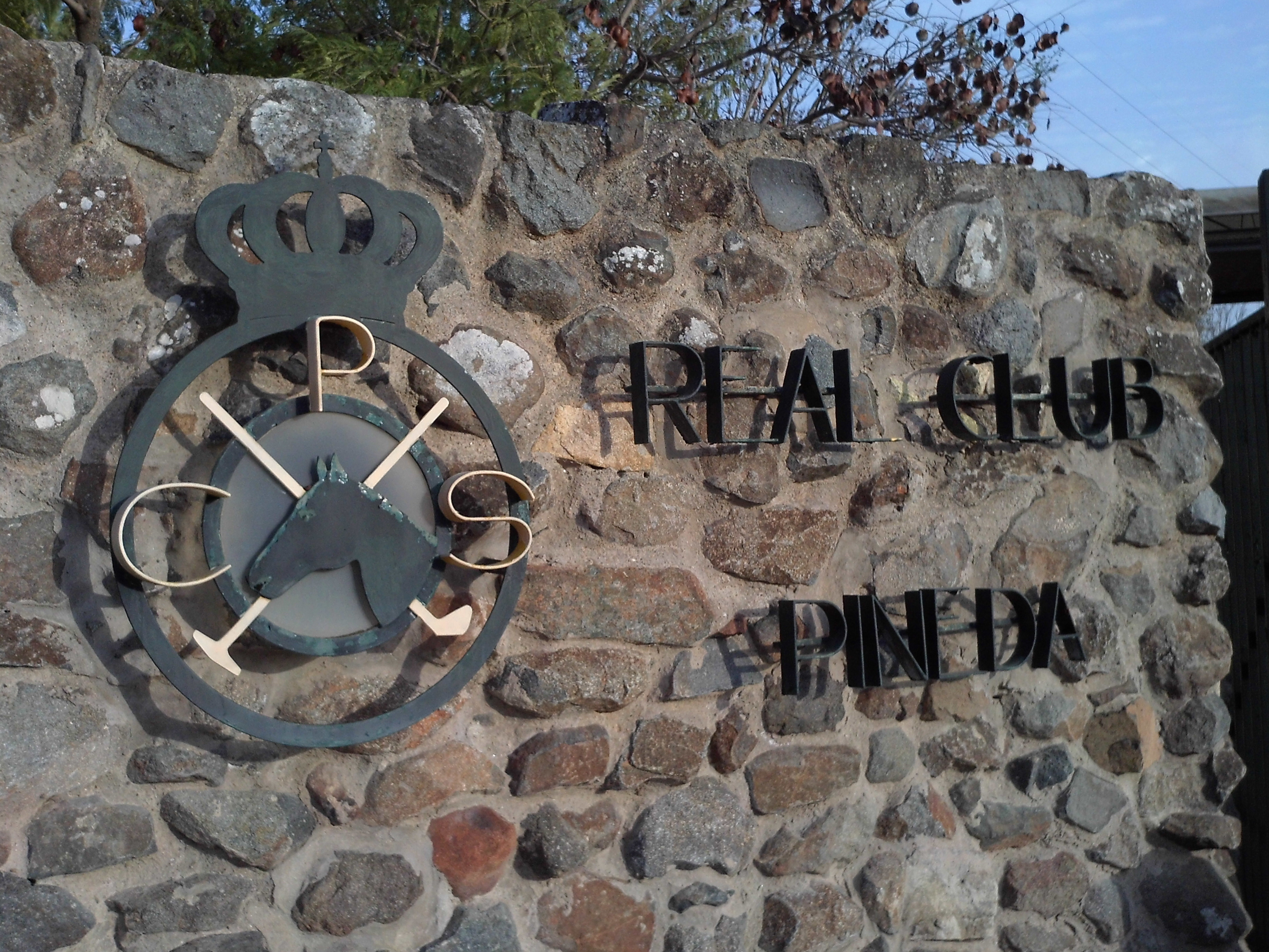 Logo del Real Club Pineda en la entrada de las instalaciones del club